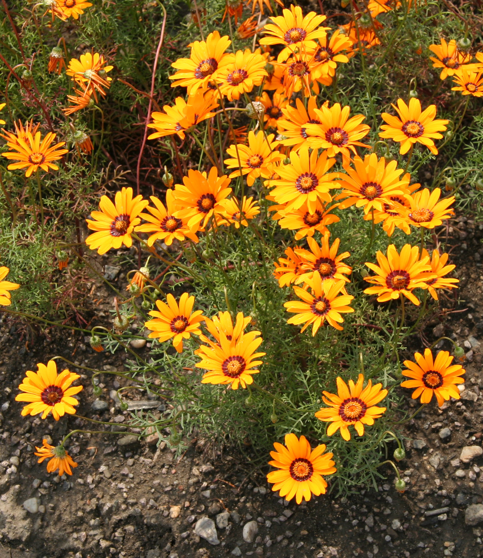 Ursinia anthemoides im Botanischen Garten Dresden